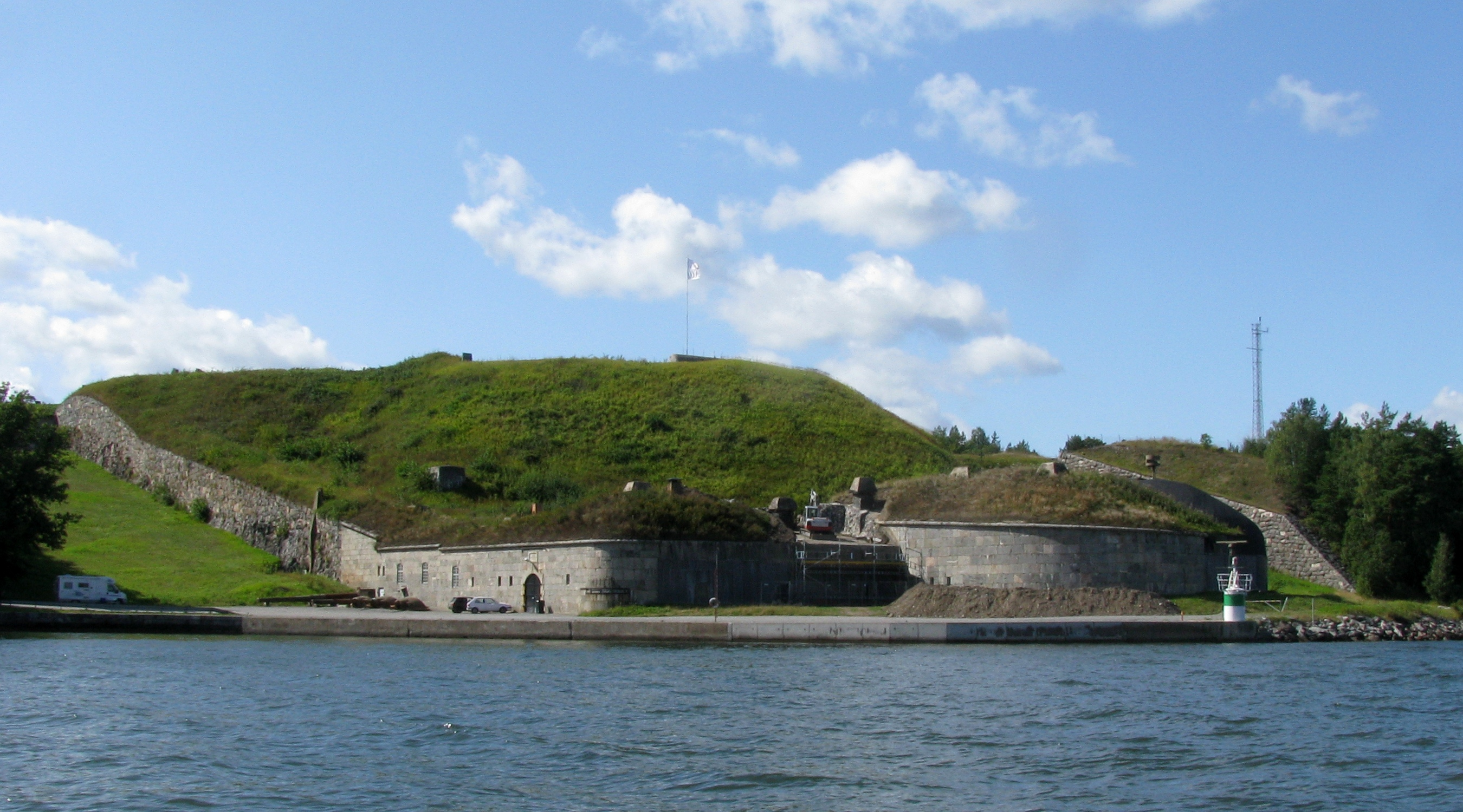 Fästningen Oskar-Fredriksborg på Rindö i Stockholms skärgård.